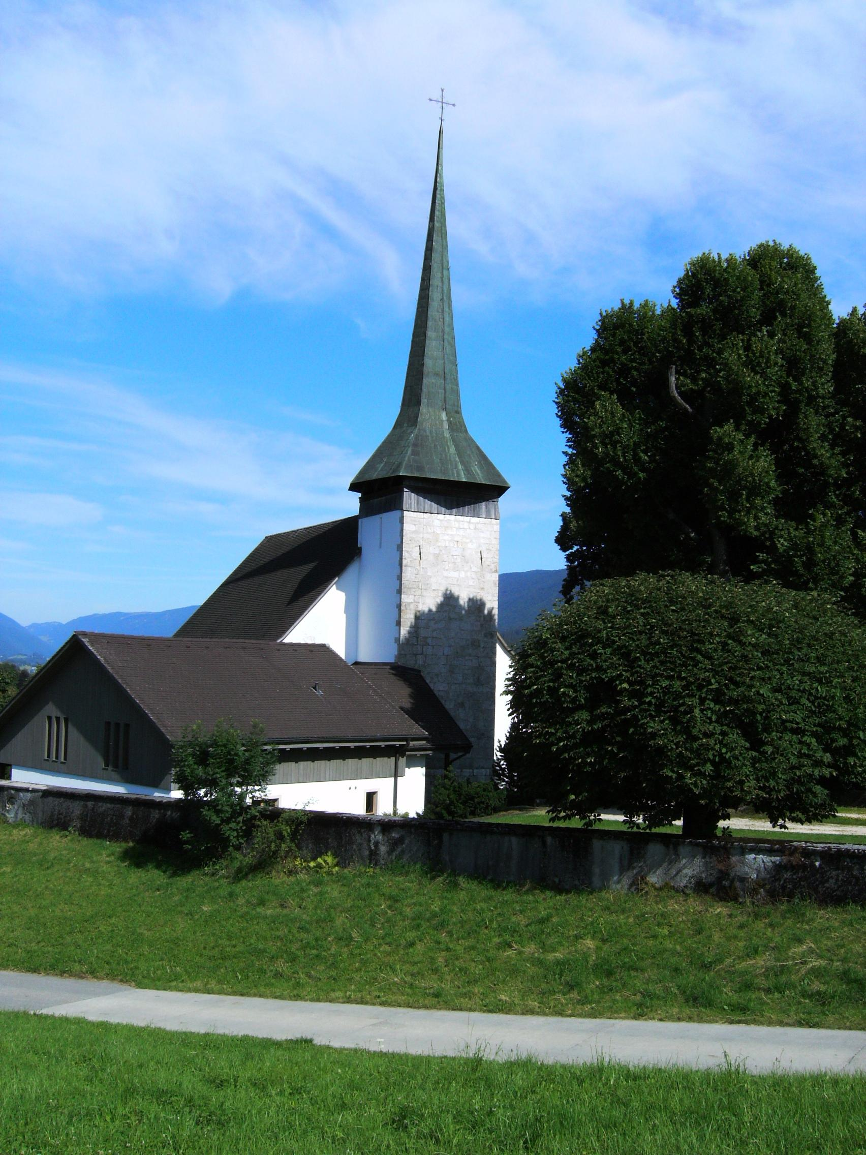 Temple de Reconvilier (canton de Berne, Suisse), dit Église de Chaindon. Prise de la photo : 582.700/231.600